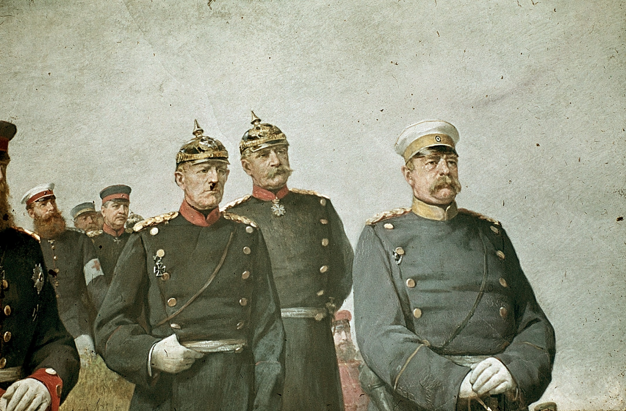 General Reille überbringt König Wilhelm I. auf dem Schlachtfelde von Sedan das Schreiben Kaiser Napoleons. Wandgemälde von Carl Steffeck (1884) für die ehemalige Ruhmeshalle Berlin. Zerstörung nach Bombentreffer um 1944. Detail mit Moltke, Albrecht von Roon, und Otto von Bismarck